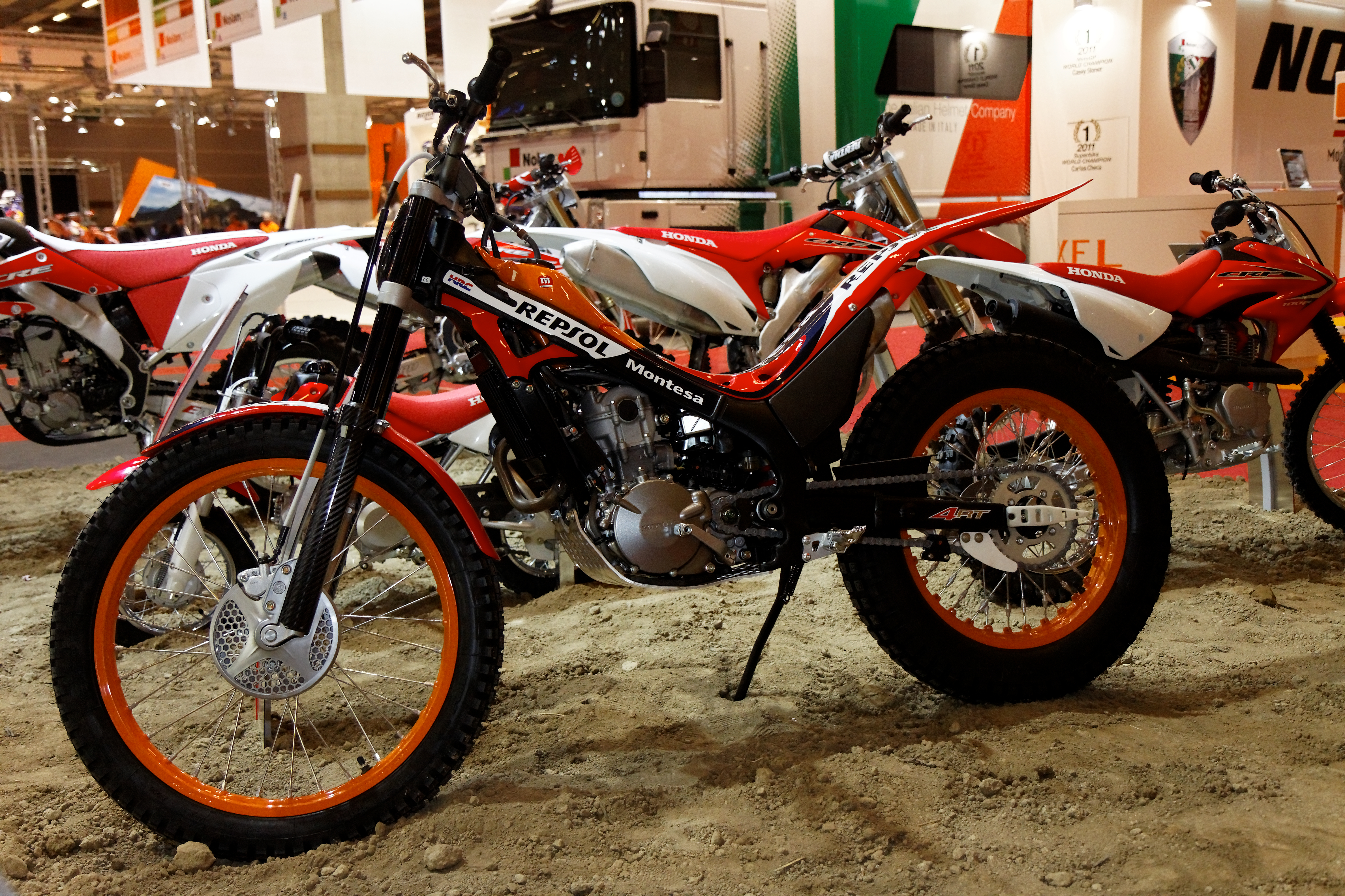 Une Cota Montesa au salon de la moto 2011.